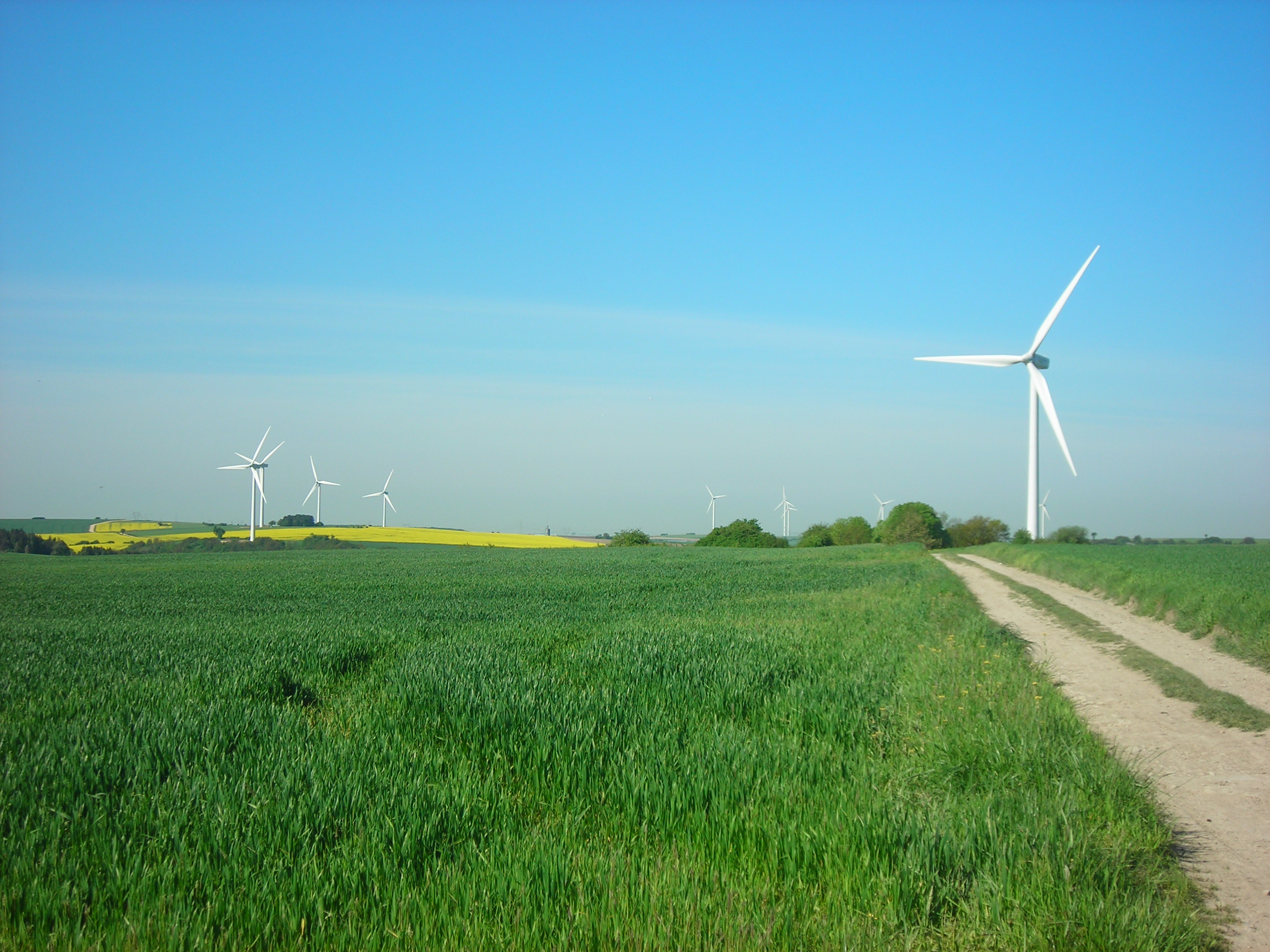 Eoliennes à Niedervisse